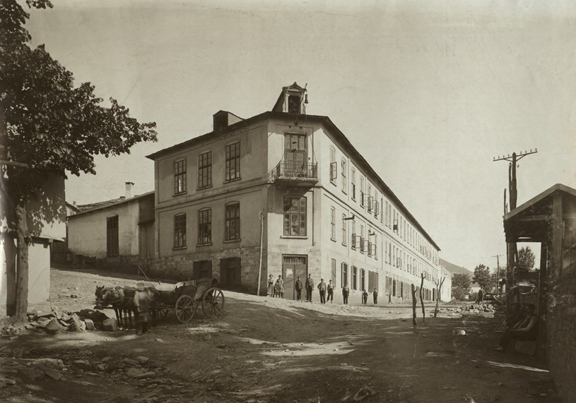 Вълнено-текстилно анонимно акционерно дружество, фабрика "Александър" в Габрово. Основано в 1883 г. с основен капитал 90 000 лева, с 25 работници. През 1912 г. е с основен капитал 884 000 лева и 211 779, 03 лева запасен капитал, 300 работници. Фотоалбум с фотографии на български индустриални предприятия от периода 1887-1912 г., подарен от Съюза на българските индустриалцина цар Фердинанд І по случай 25-годишнината от възшествието му на българския престол.